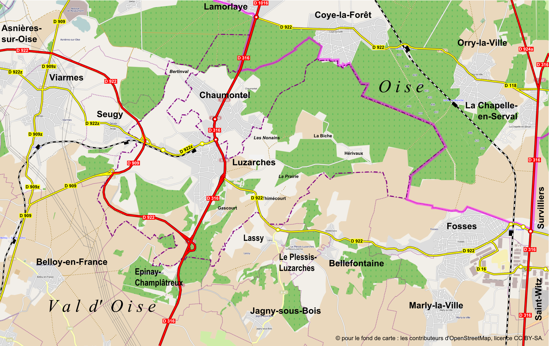 Voies de communication de la commune de Luzarches (principales routes départementales et voies ferrées SNCF). Limites de la commune. Limite des départements du Val-d'Oise et de l'Oise.